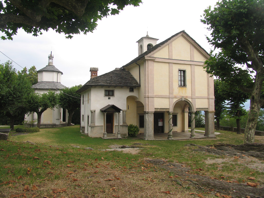 Sacro Monte della Ss. Trinità di Ghiffa 07/2009